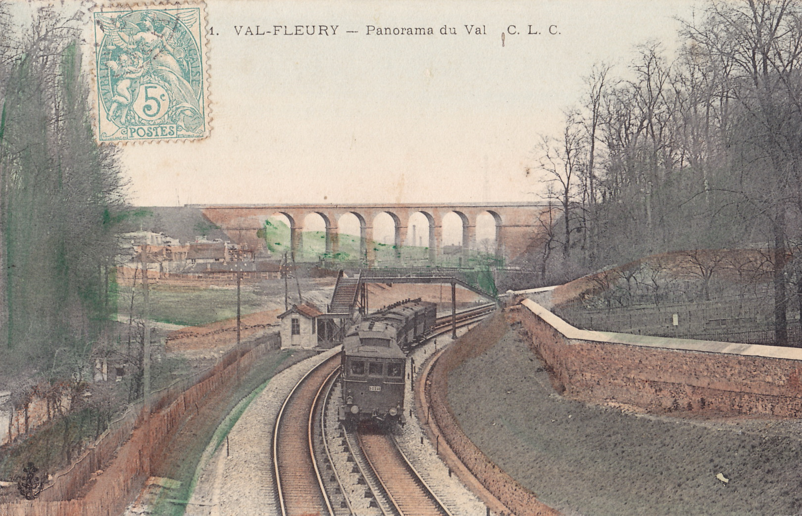 Carte postale ancienne éditée par CLC n°1 :VAL-FLEURY - Panorama du Val